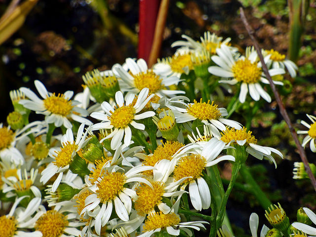 Flores de Margarita de bañado